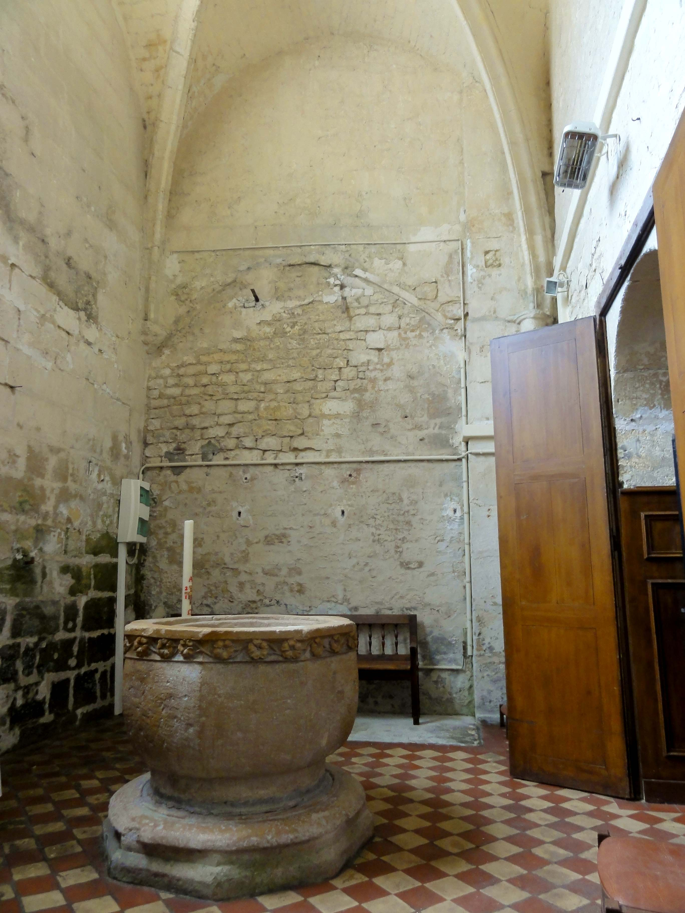 Intérieur de l'église (voir titre).